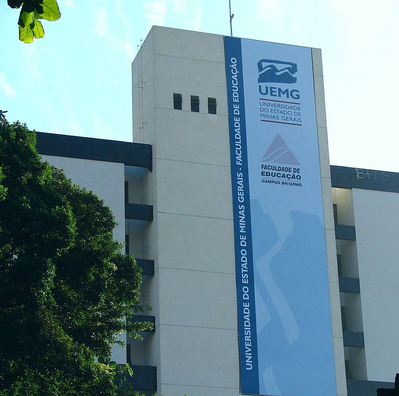 Faculdade de Educação da Universidade do Estado de Minas Gerais